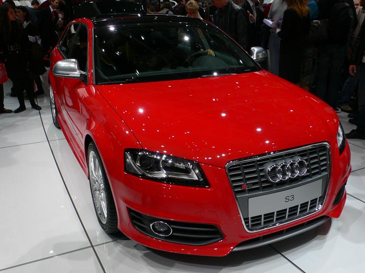 Audi S3